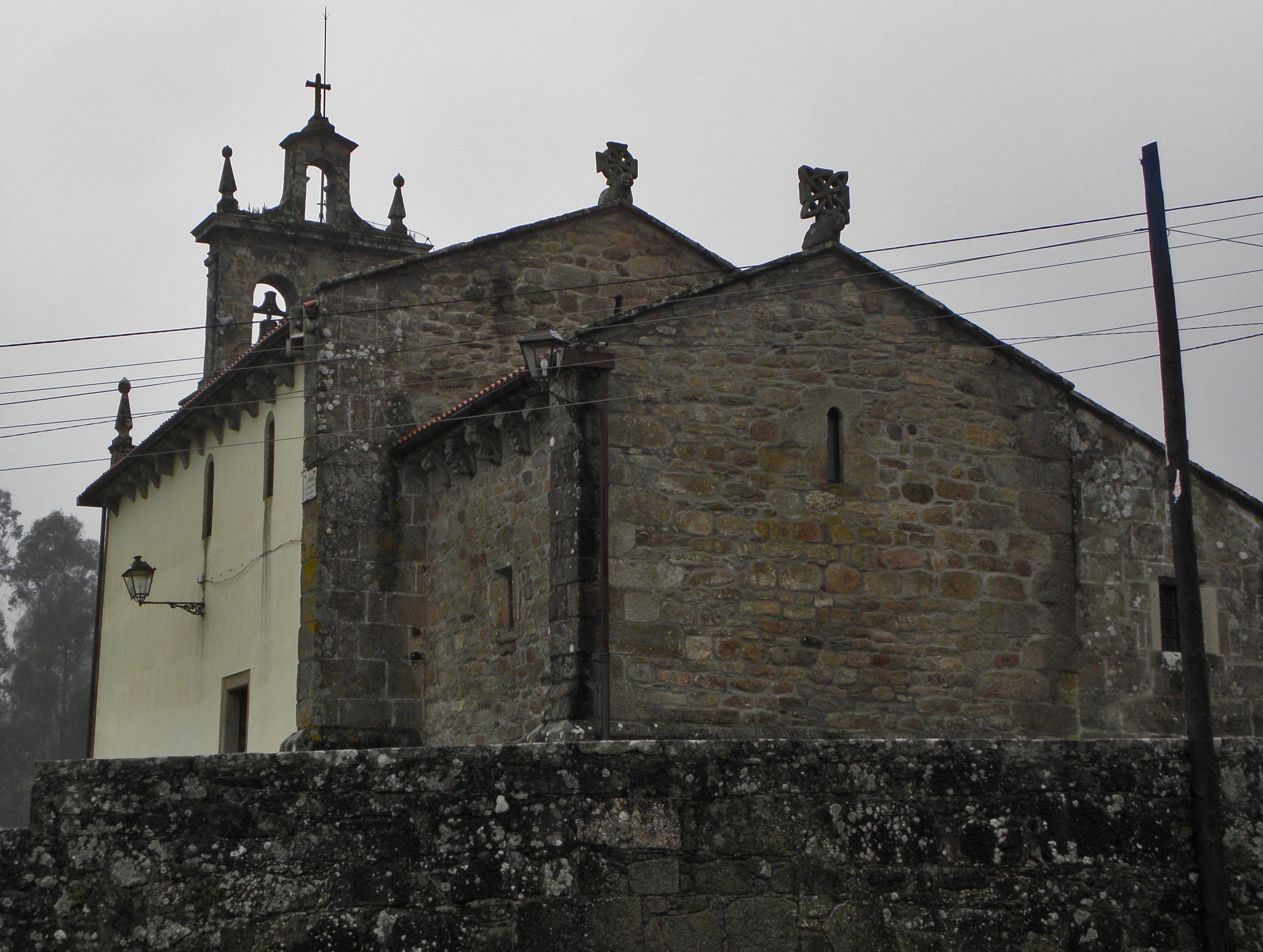 Santa María de Figueiras (Santiago de Compostela)